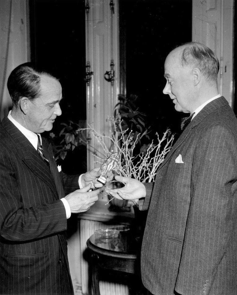 Vid Publicistklubbens styrelsesammanträde på söndagen överlämnade vice ordföranden chefredaktör Manne Ståhl en statyett av Stig Blomberg till redaktör Erik Brandfeldt, Göteborgs-Posten, som erkänsla för den bästa insatsen vid försäljning av lotter i Publicistföreningens lotteri. Redaktör Brandfeldt sålde 2,503 lotter. Den försäljare som kom närmast på prislistan hade endast sålt 926 lotter.